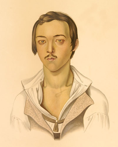 Karl Heinrich Baumgärtner Carl Friedrich Sandhaas Krankenphysiognomik Gelbsucht Icterus